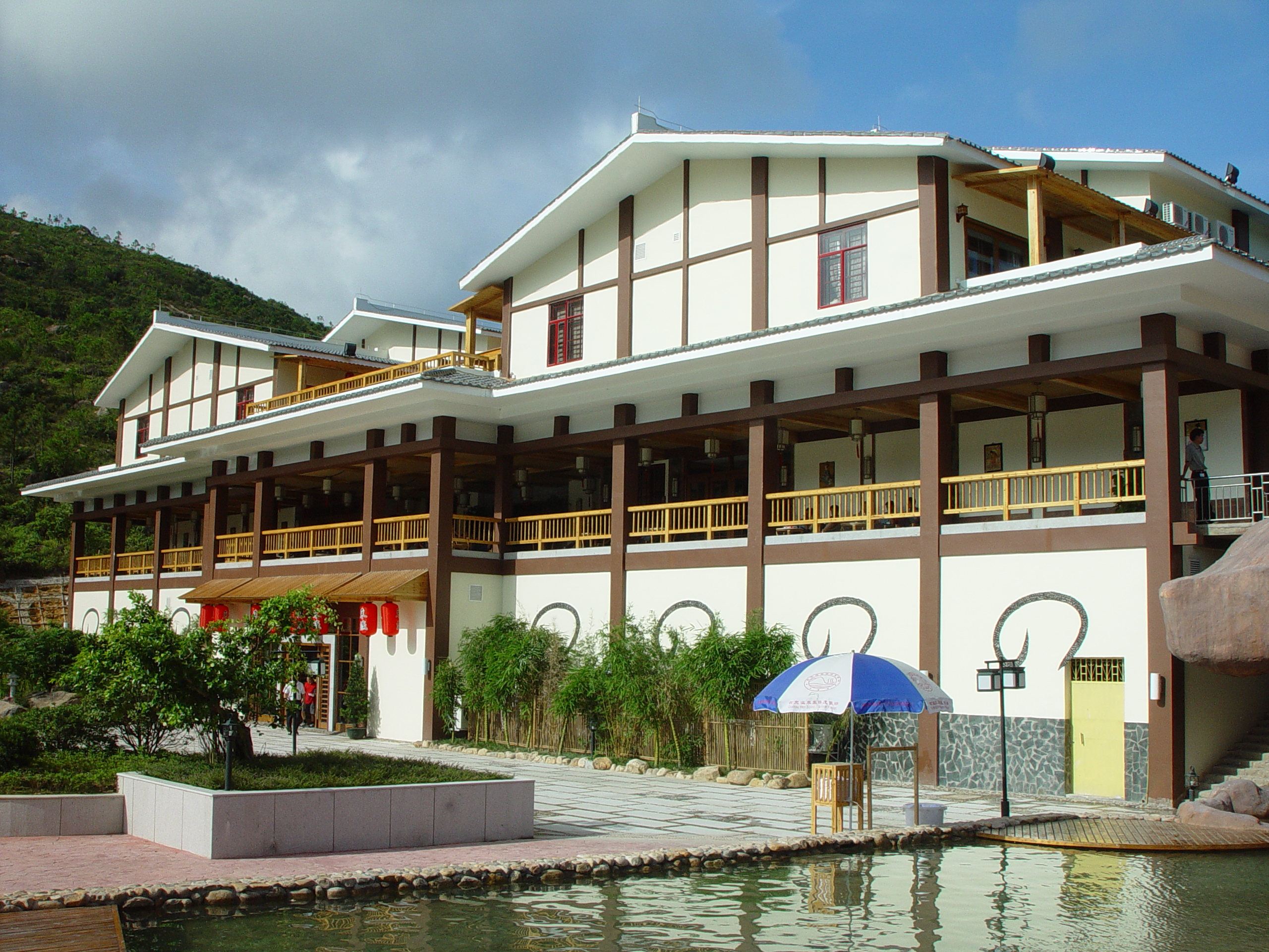 這是古兜溫泉東瀛閣